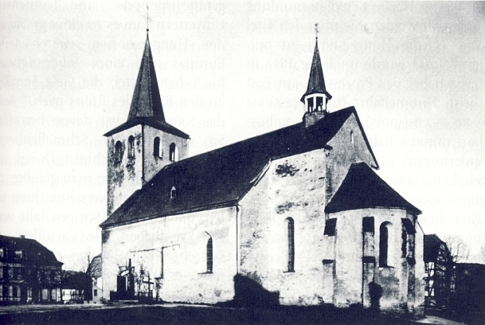 Schmallenberg alte Kirche um 1900 (Germany)